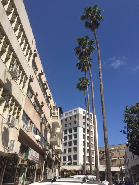 בשנת 1932 התקיים במקום בו נטועים העצים (רחוב השפלה 4 תל אביב) יריד המזרח הראשון בו היה שימוש בשם הזה (היו תערוכות קודמות עם שמות אחרים) התמונה צולמה לצורך הוכחת קיומם של ארבעה עצים ולא שלשה כפי שנכתב בערך זה.